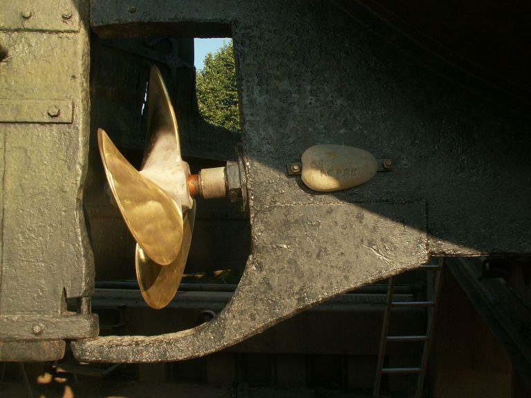 Zinkanode, nieuw.